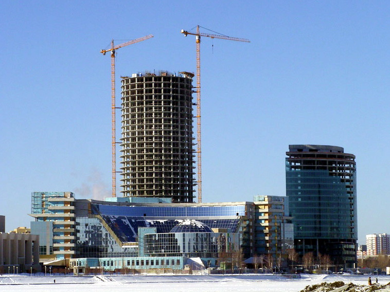 Часть строящегося «Екатеринбург Сити»